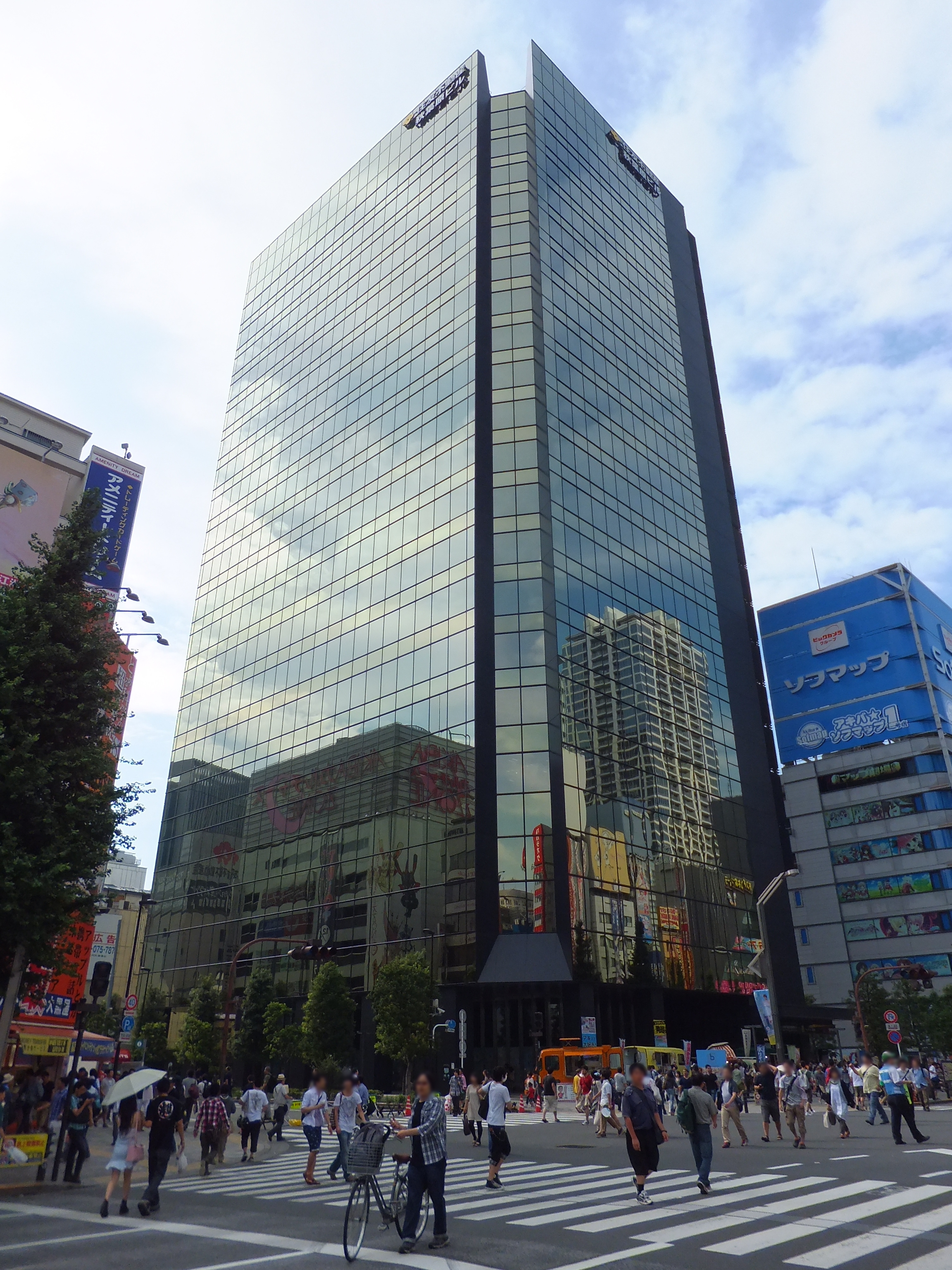 住友不動産秋葉原ビル